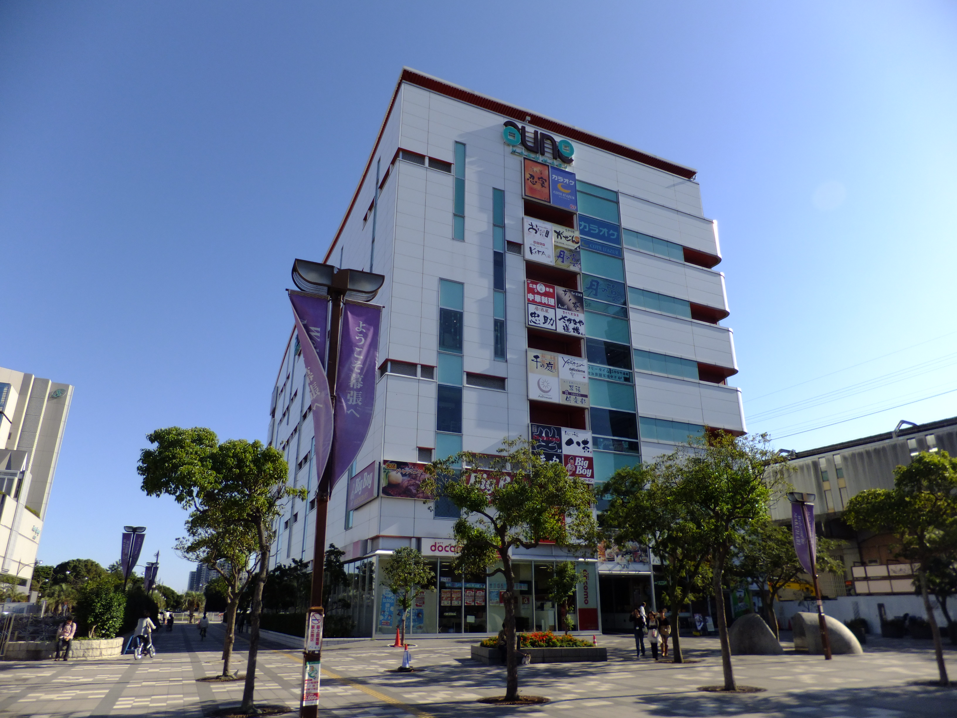 京葉線・海浜幕張駅前の商業施設「aune 幕張（アウネ幕張）」（千葉県千葉市）